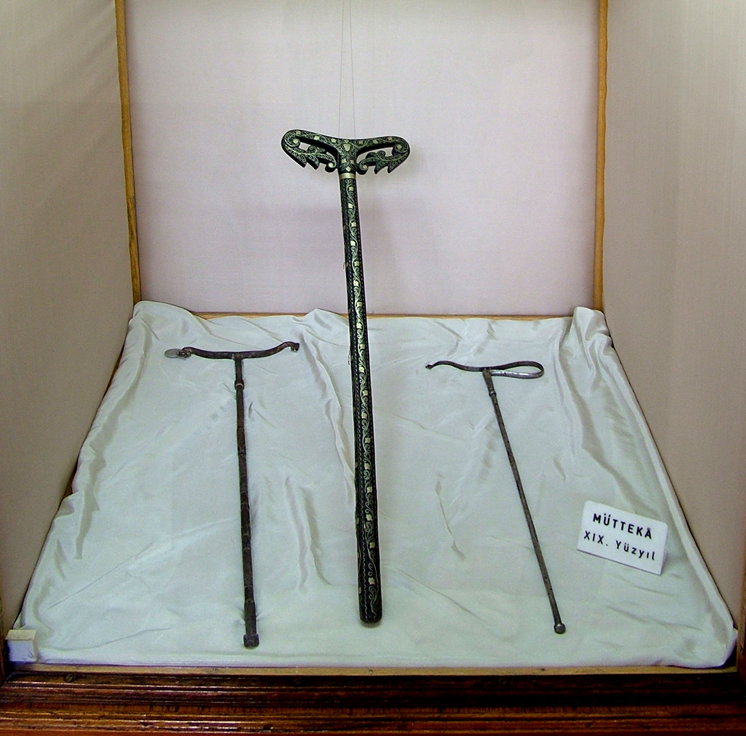 Relikviák a Mevlana Múzeumban (Konya, Törökország)